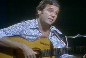 Músico brasileiro Carlos Lyra em imagem do acervo da TV Brasil.